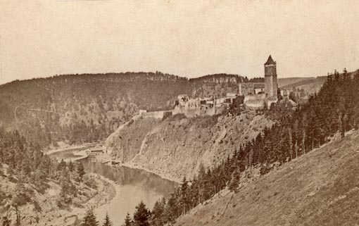 Hrad Zvíkov - skalnatá ostrožna nad soutokem Vltavy a Otavy, na níž stávalo před existencí hradu Zvíkov hradiště